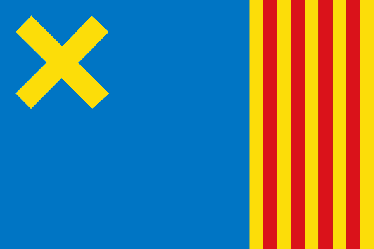 Bandera de Camós basat en l'escut d'armes